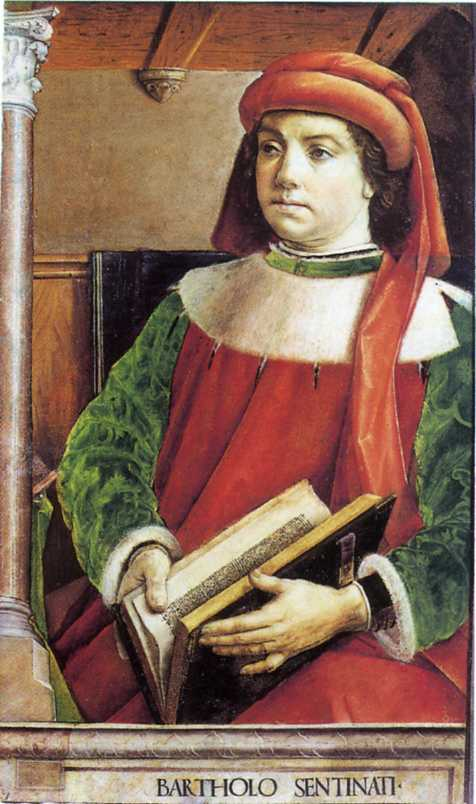 Bartholo Sentinati (Bartolo da Sassoferrato) - Studiolo di Federico da Montefeltro